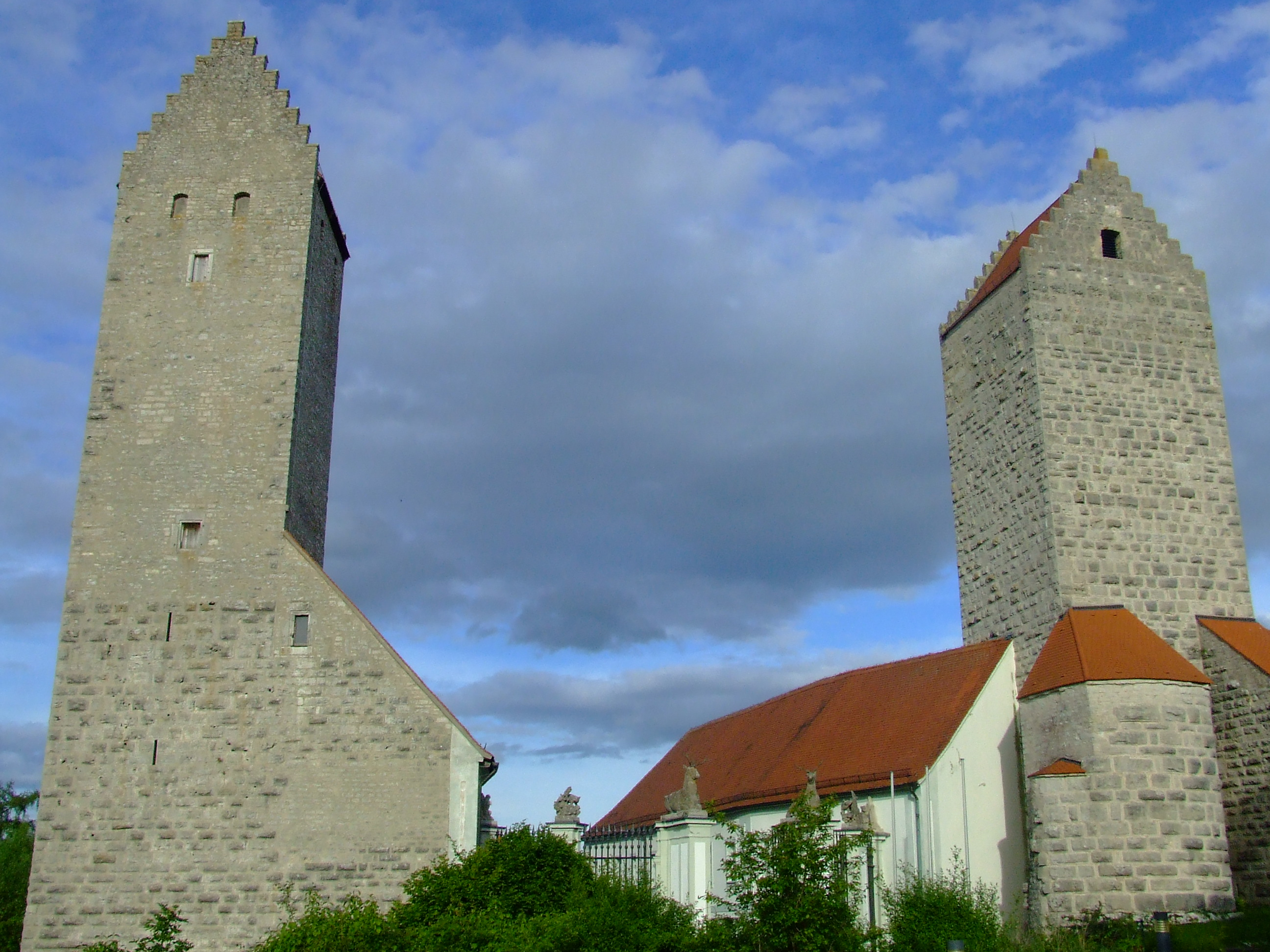 Stadt Beilngries in Oberbayern, Kreis Eichstätt, Schloss Hirschberg, mittelalterliche Wehrtürme.